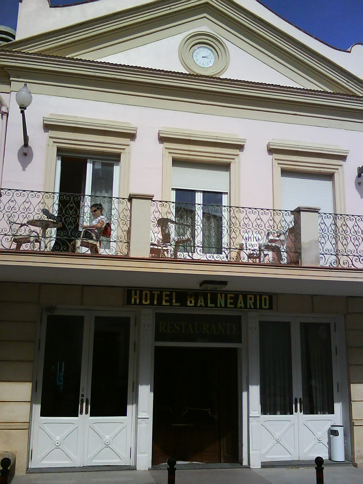 Hotel Balneario in Fortuna, Spain.